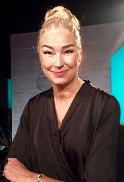 Eva Beckman, domare i tv-programmet "Kulturfrågan Kontrapunkt" våren 2019.